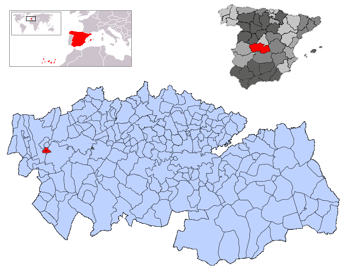 Alcañizo en la provincia de Toledo